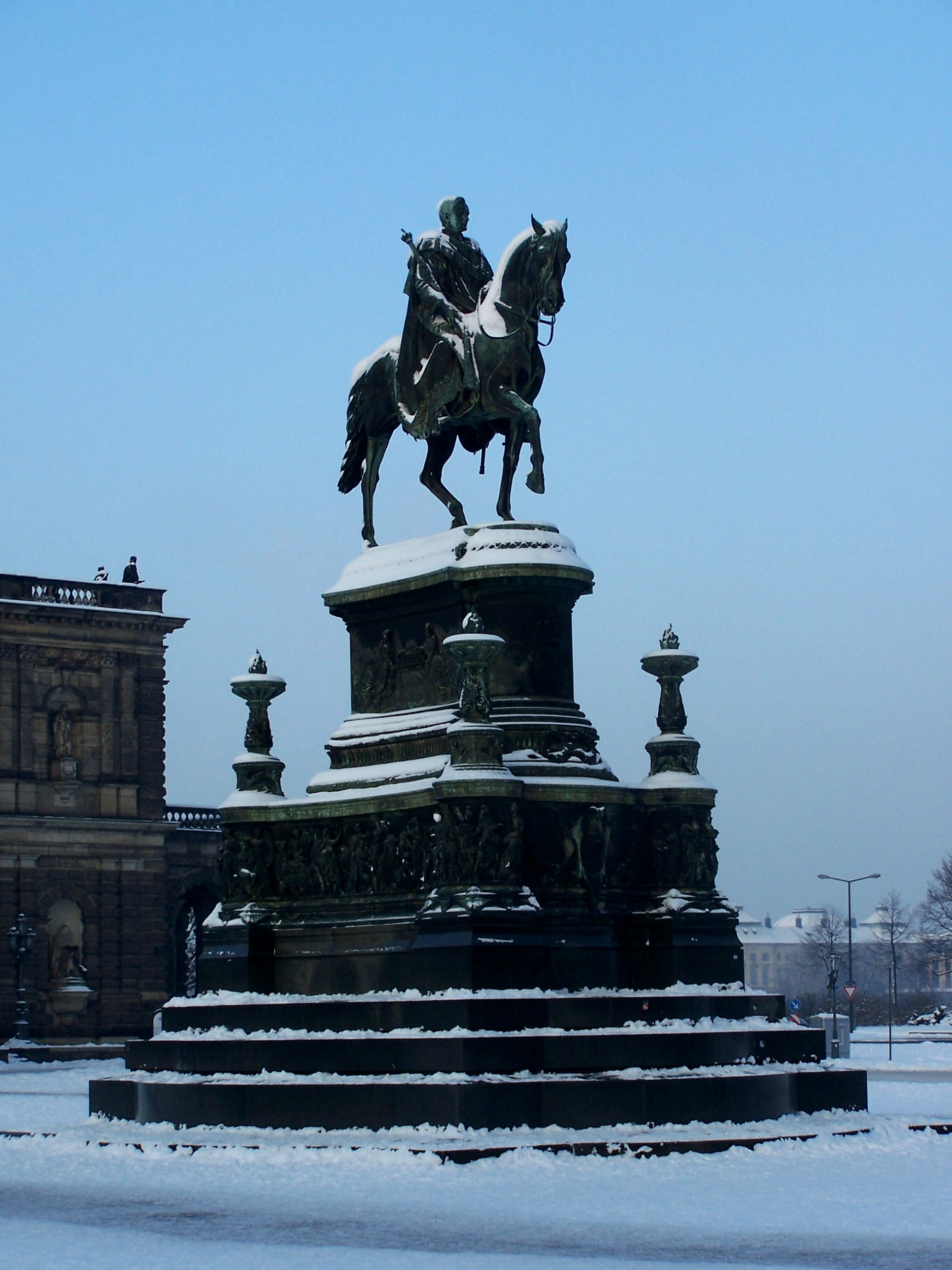 Dresden, Theaterplatz